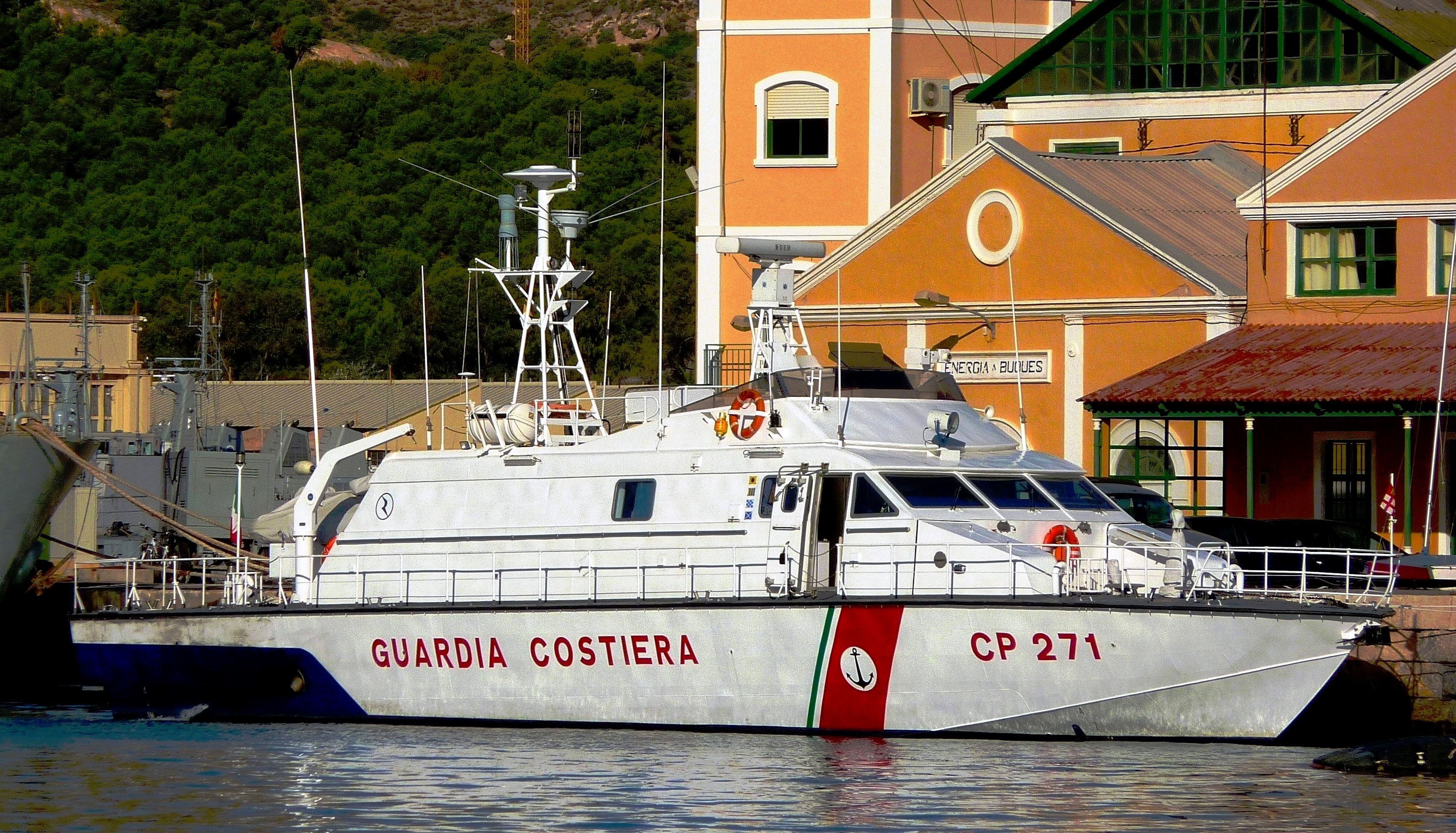 Patrullero de altura clase 200/S de la Guardia Costera Italiana en Cartagena (España).